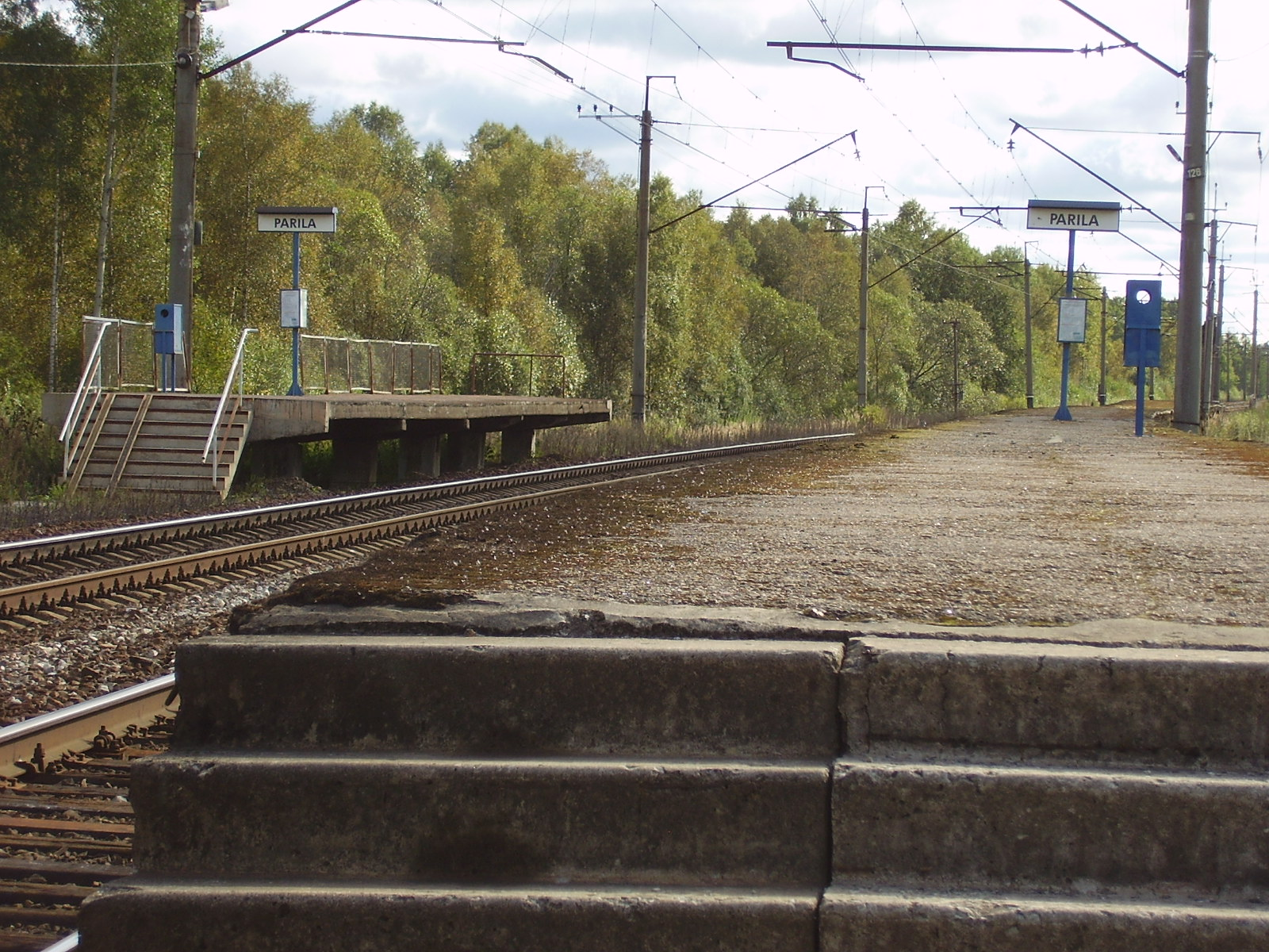 Pilt Parila raudteepeatusest